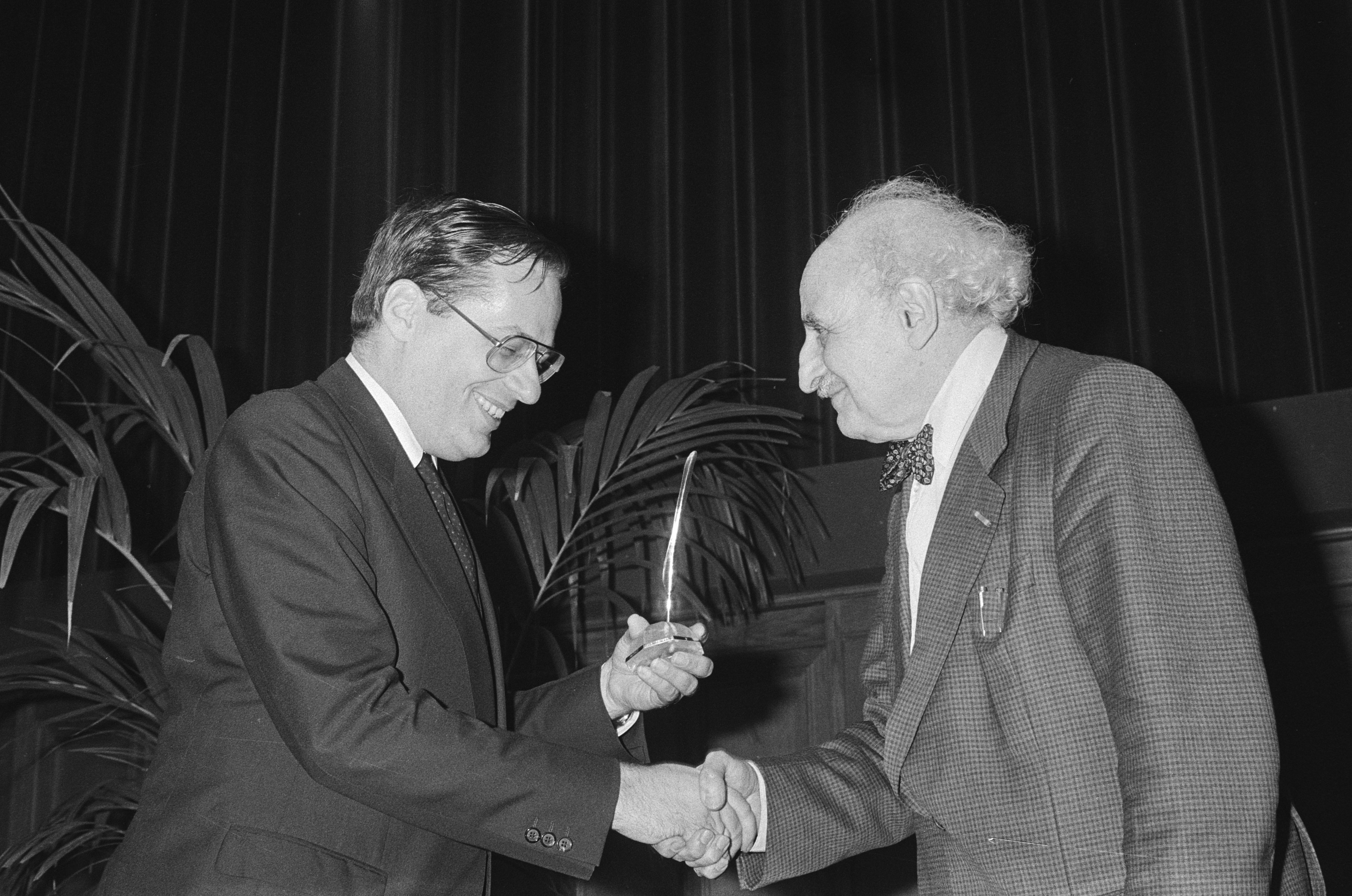 Minister Deetman reikt de cultuurprijs "De Gouden Ganzeveer" uit aan prof. dr. H. Freudenthal tijdens jaarvergadering van Kon. Ned. Uitgeversbond